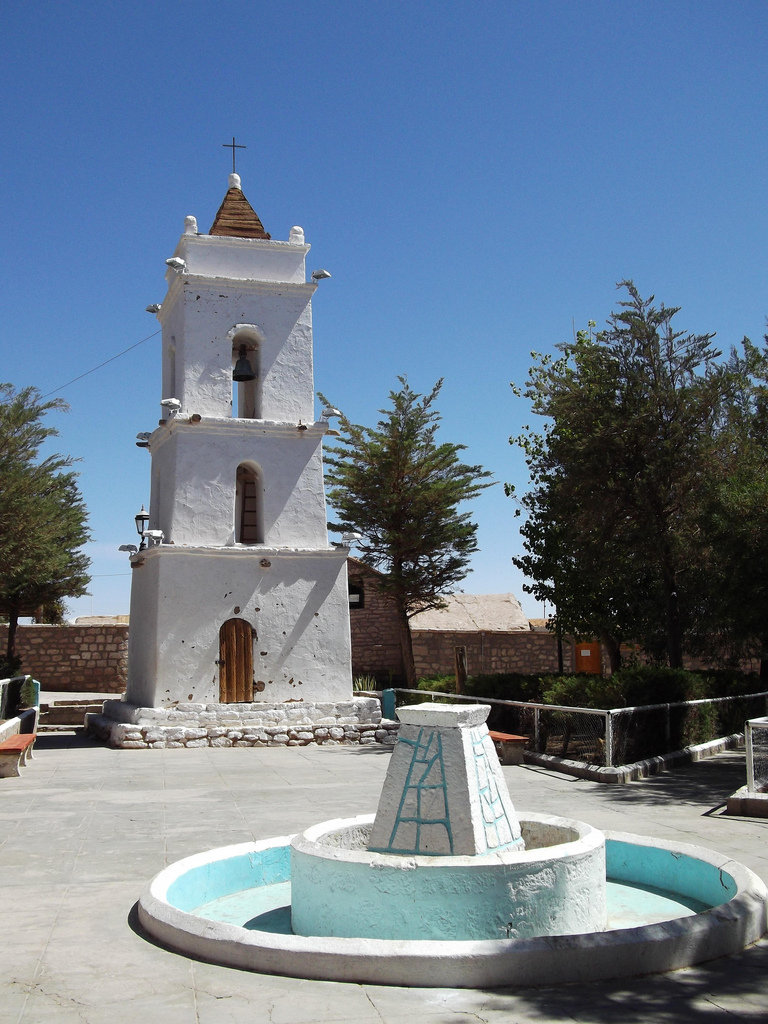 Campanario de San Lucas, localizado en la plaza del pueblo de Toconao. Toconao, Chile.